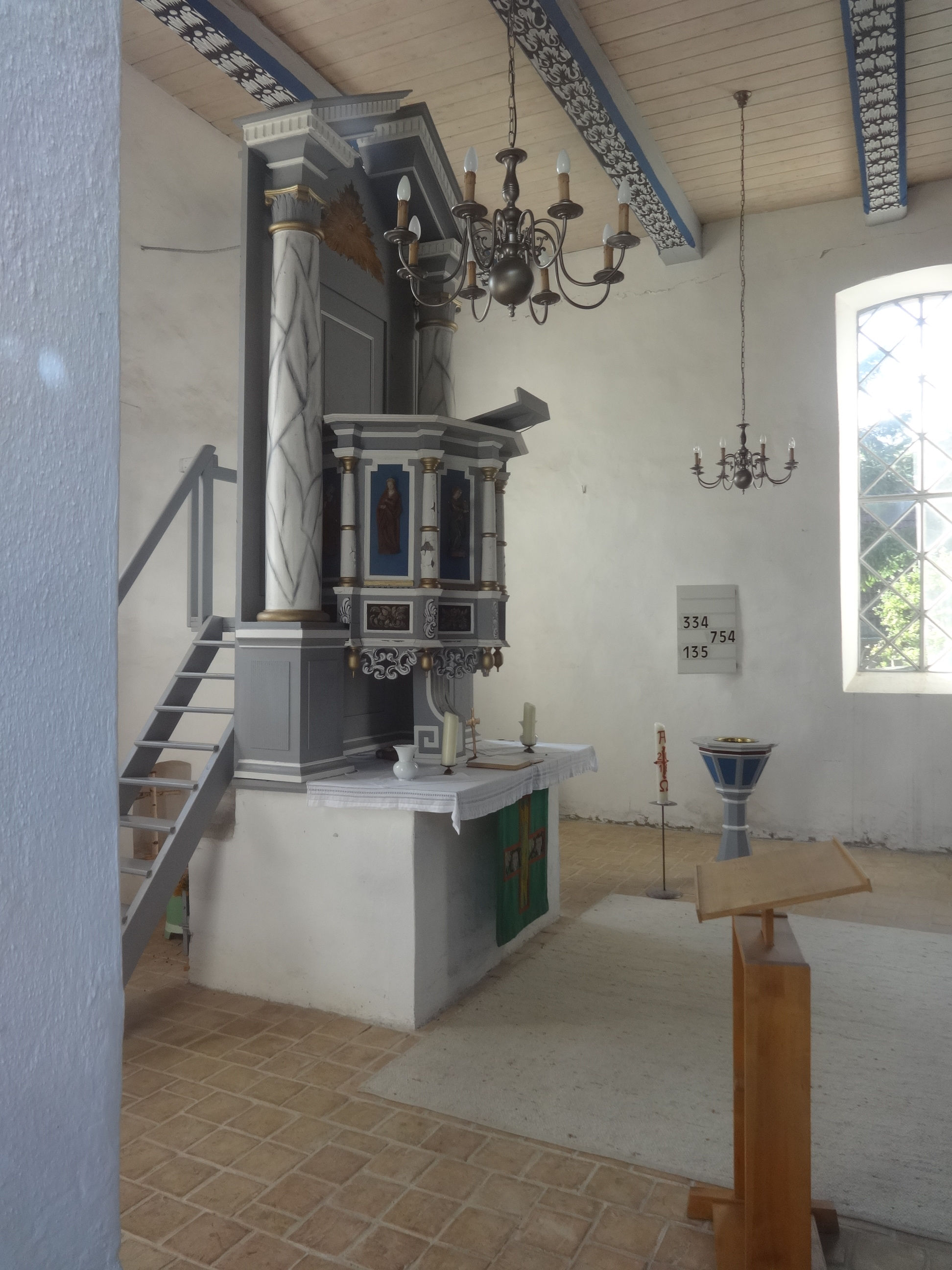 Die Dorfkirche in Jatznick ist eine Feldsteinkirche, die vermutlich im 14. Jahrhundert entstand und um 18. Jahrhundert barock überformt wurde. Im Innern befindet sich eine barocke Ausstattung, die überwiegend aus dem Jahr 1733 stammt.